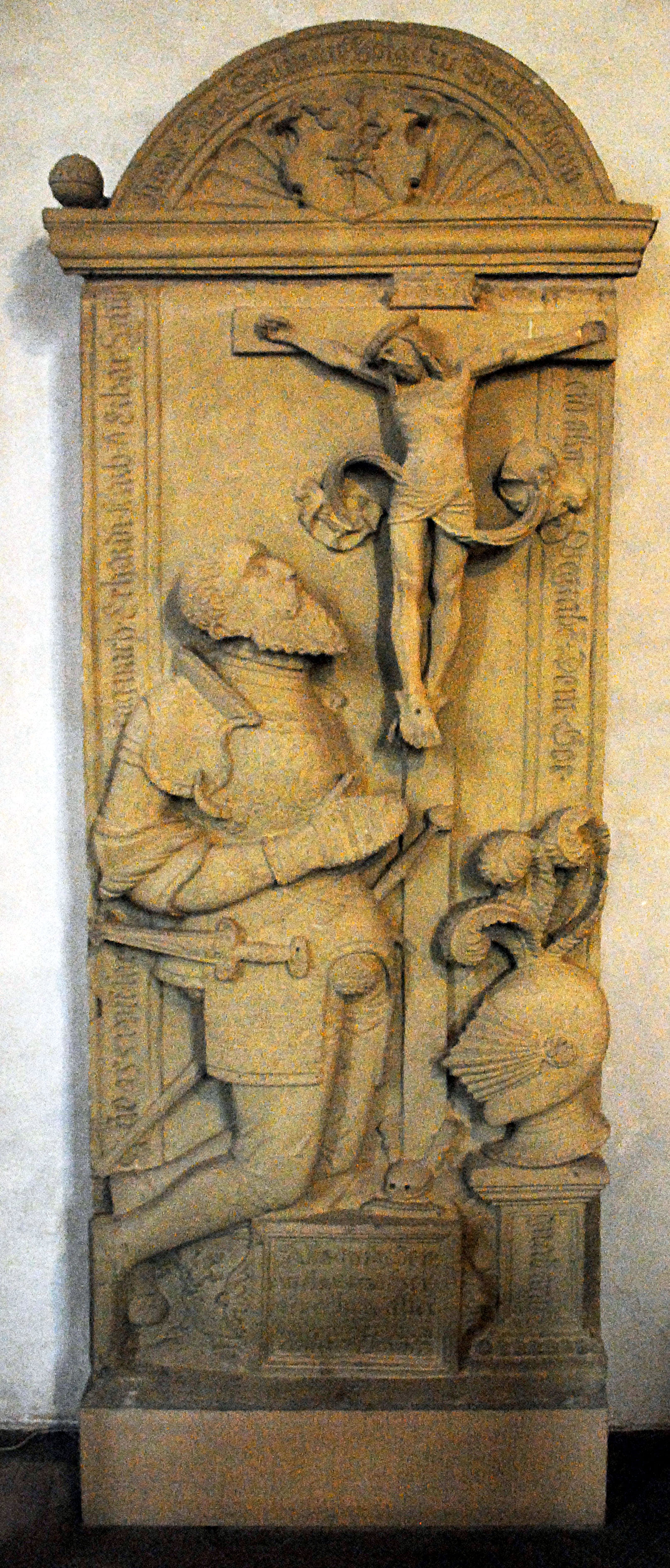 Epitaph, Maria im Weingarten, Volkach